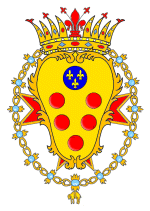 Bandiera del granducato di Toscana (1562-1737) con lo stemma dei Medici.